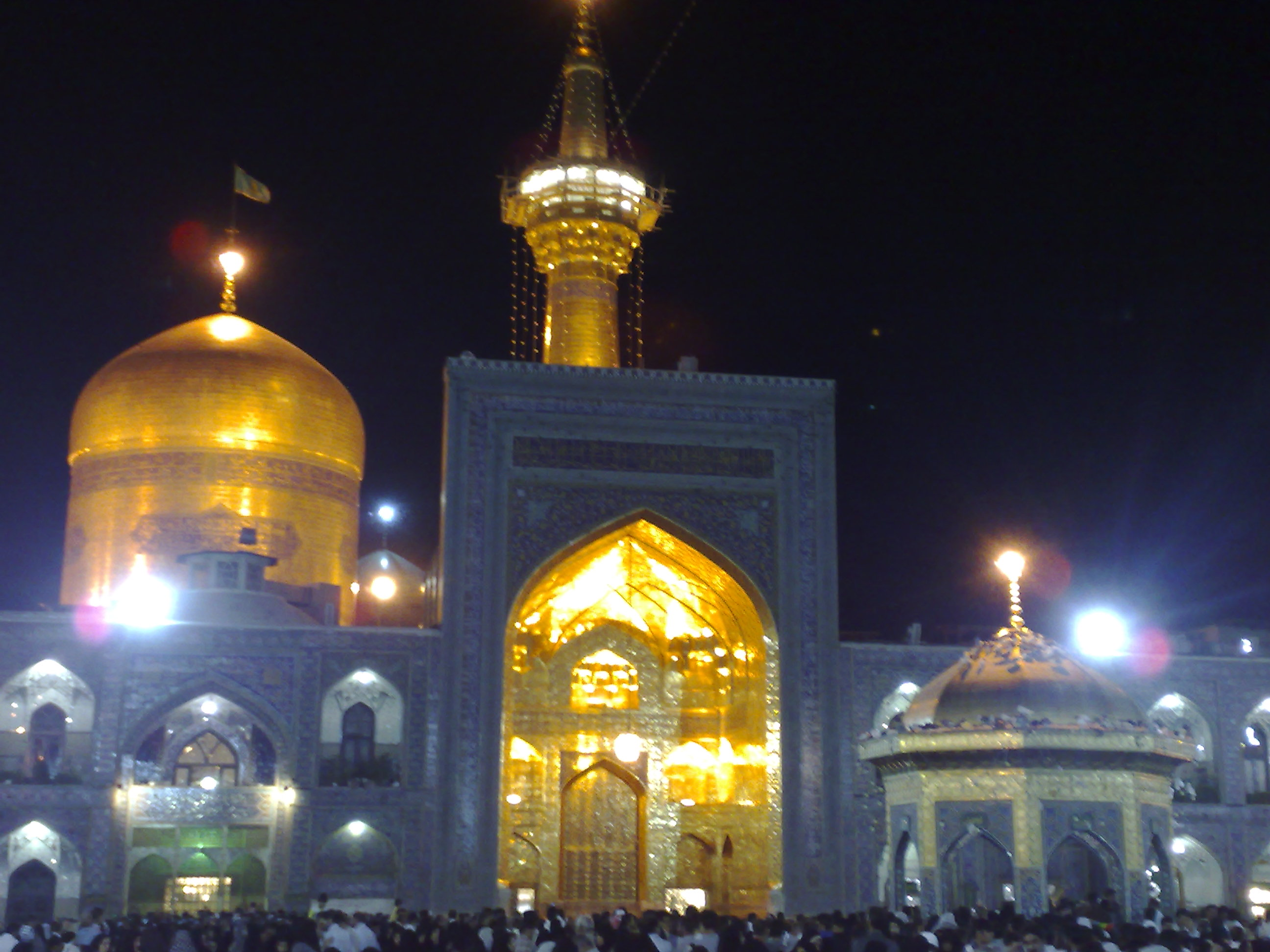 ایران - مشهد مقدس - حرم امام رضا (ع)